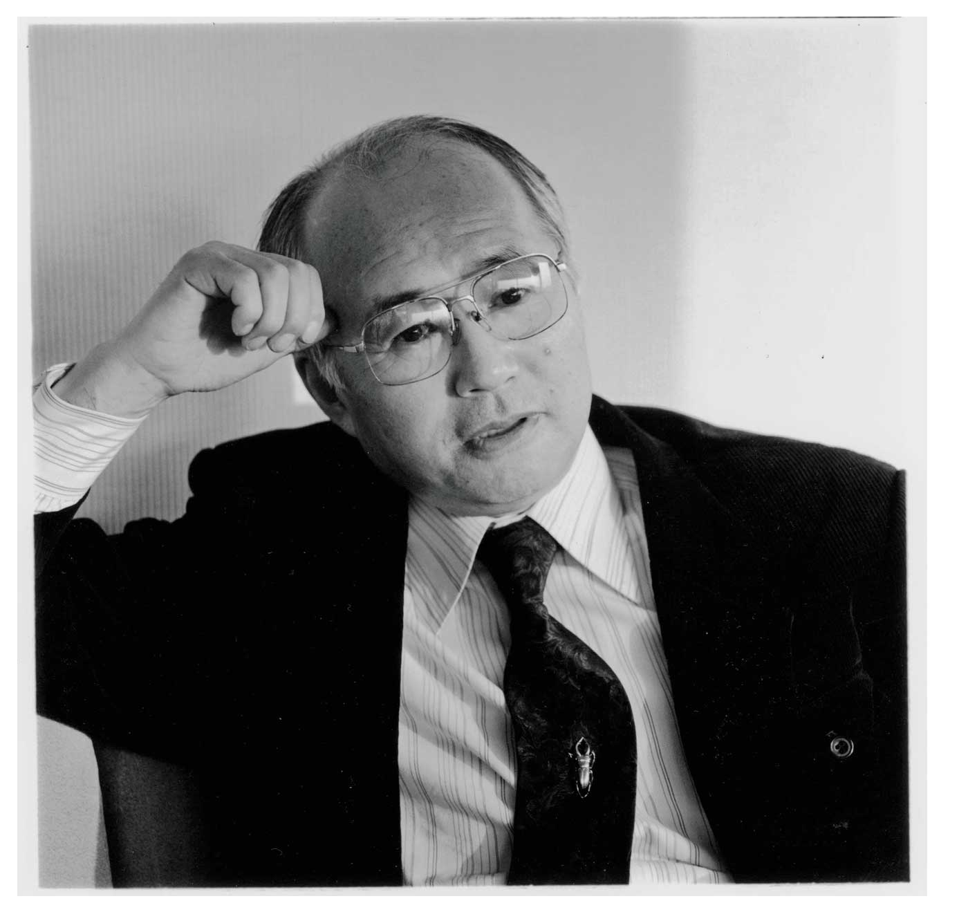 奥井一満（おくいかずみつ）のプロフィール画像